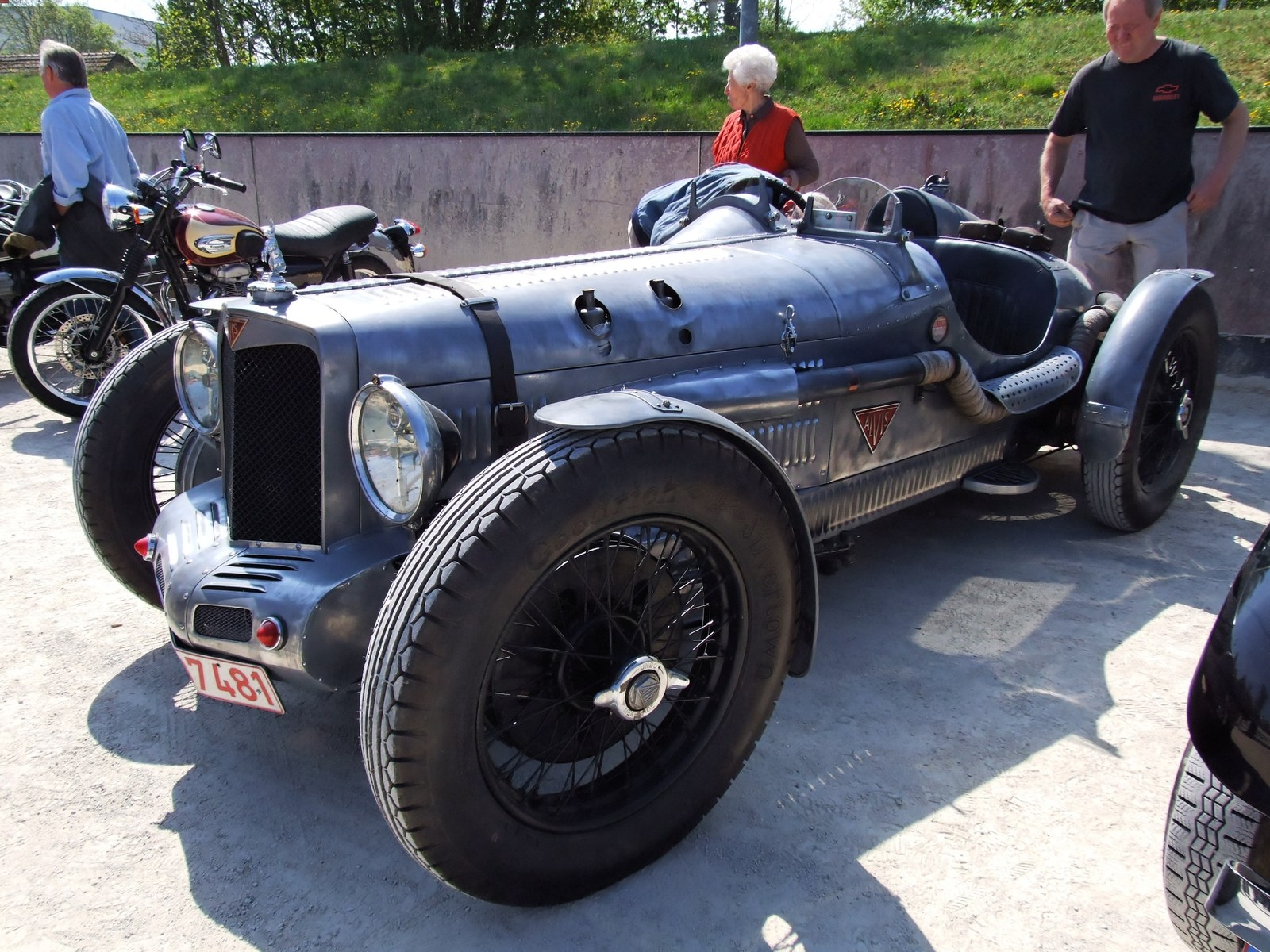 Quelle: selbst fotografiert, 04/2007 Fotograf: Späth Chr.